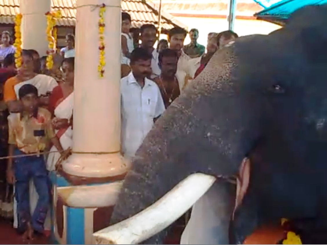 വാഴപ്പള്ളി ഗണപതിക്ഷേത്രത്തിലെ ഗജപൂജ